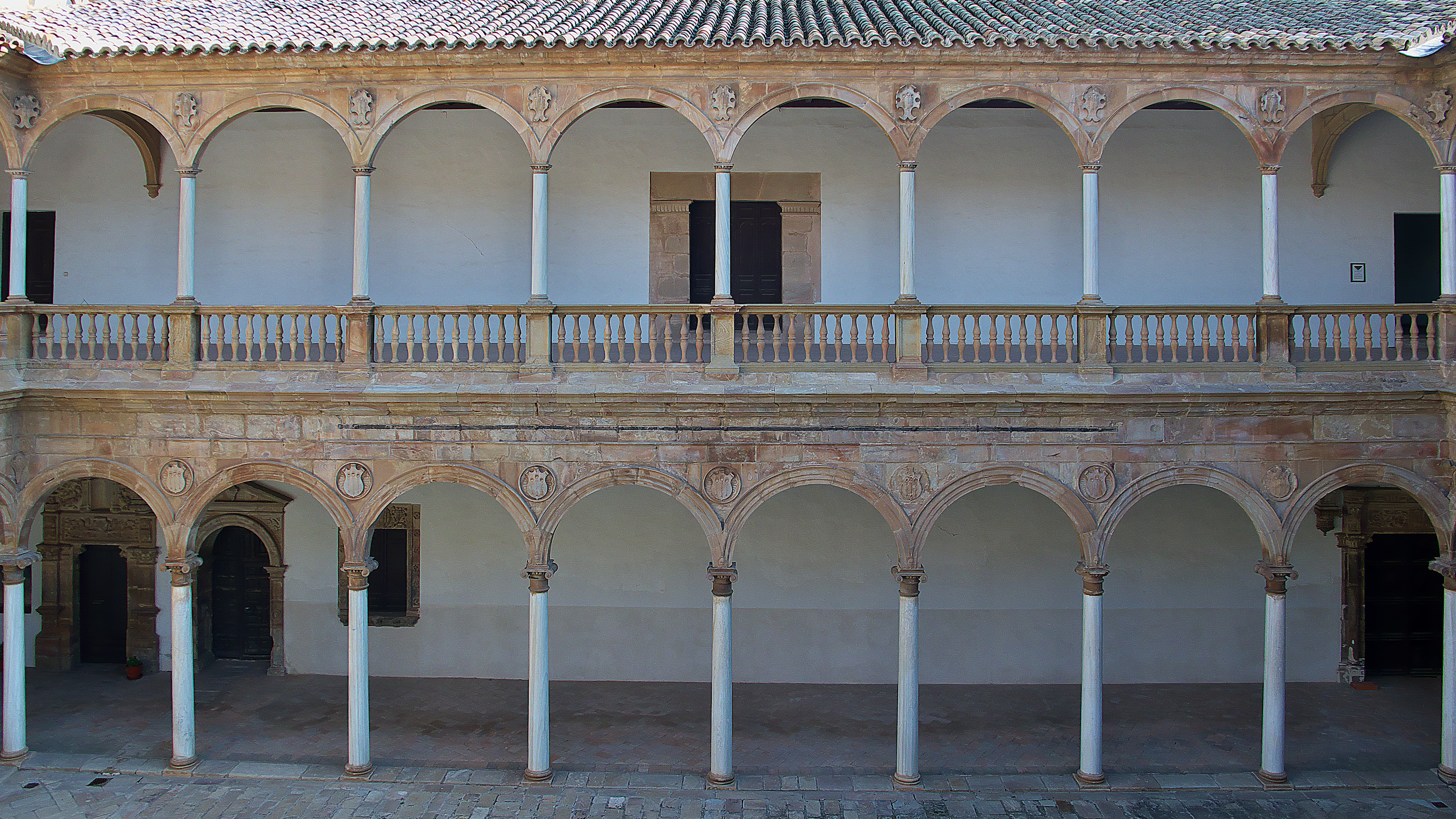 Convento de la Asunción. Antón Egas, Enrique Egas el Mozo, y el promotor fray Gutierre de Padilla, consiguen la pureza de un estilo arquitectónico.